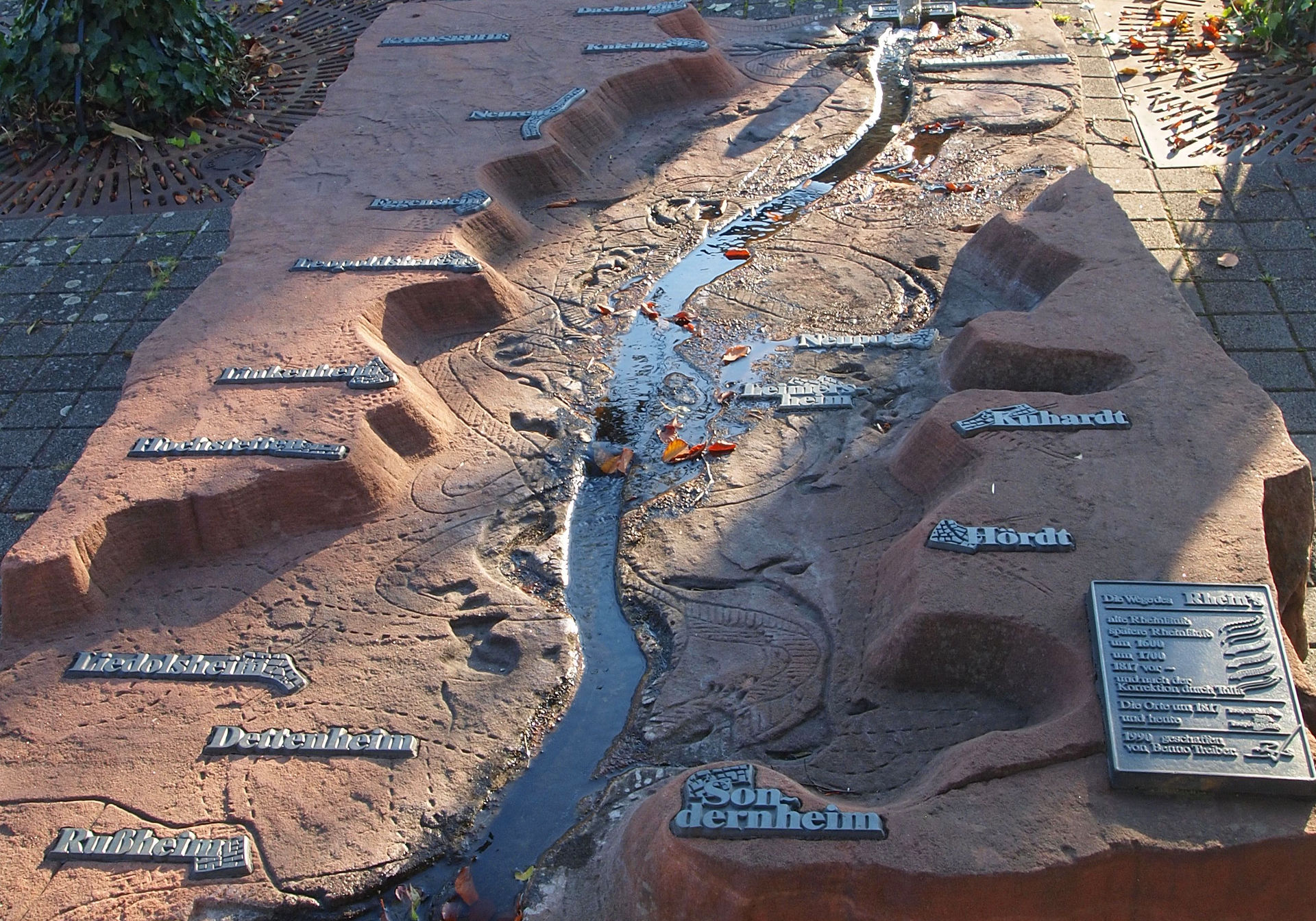 Rheinbegradigungsdenkmal in Leopoldshafen